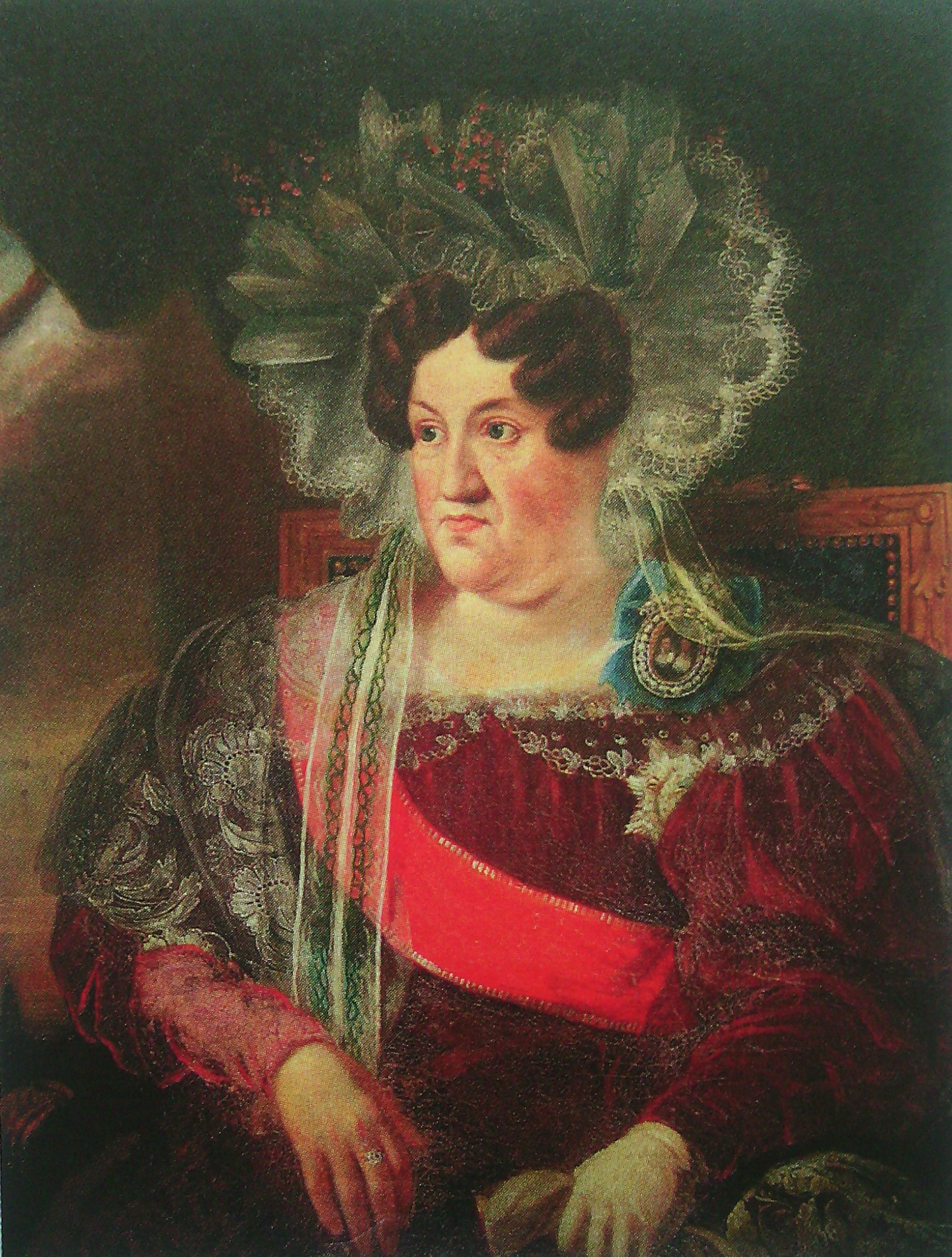 Александра Николаевна Репнина-Волконская (1757—1834)